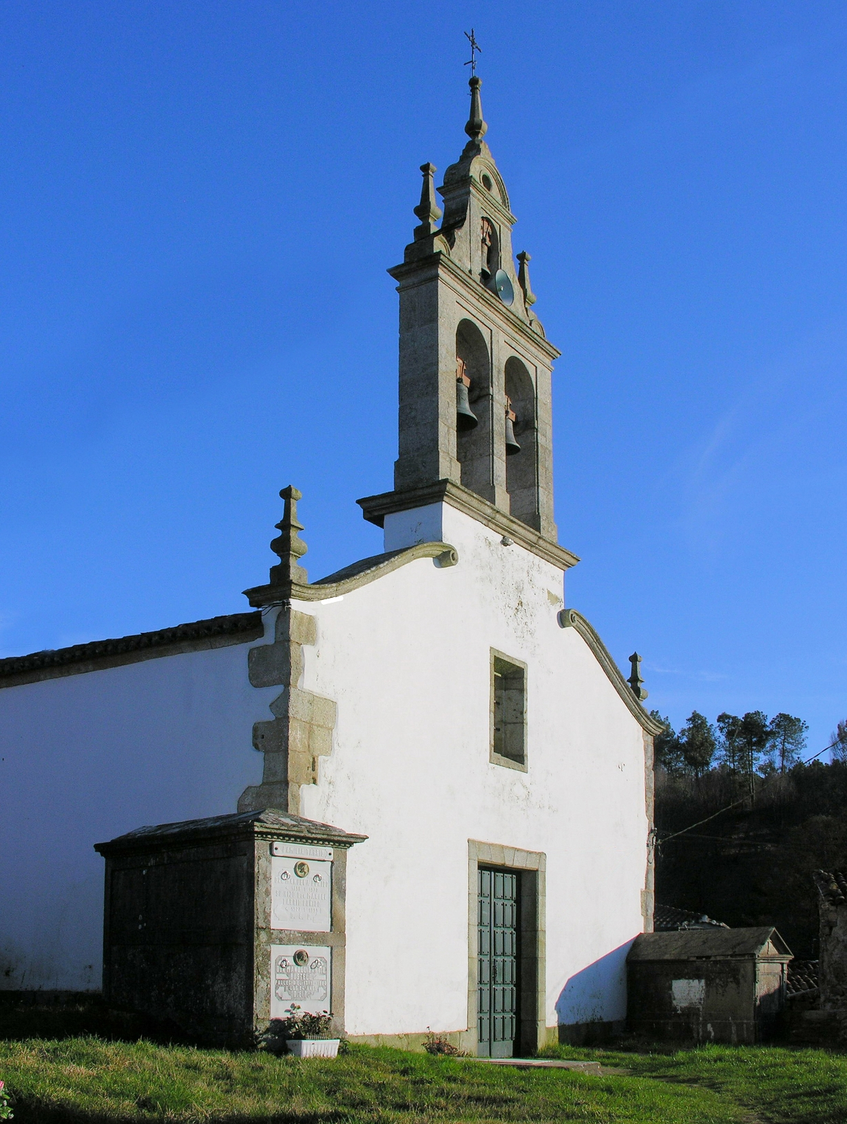 Parroquia de Furelos, Concello de Melide, Galiza